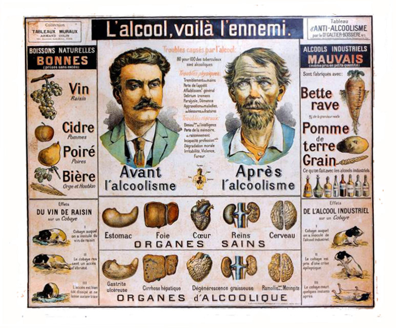 Tableau anti-alcoolisme du Docteur Galtier-Boissière, tableaux muraux Armand Colin